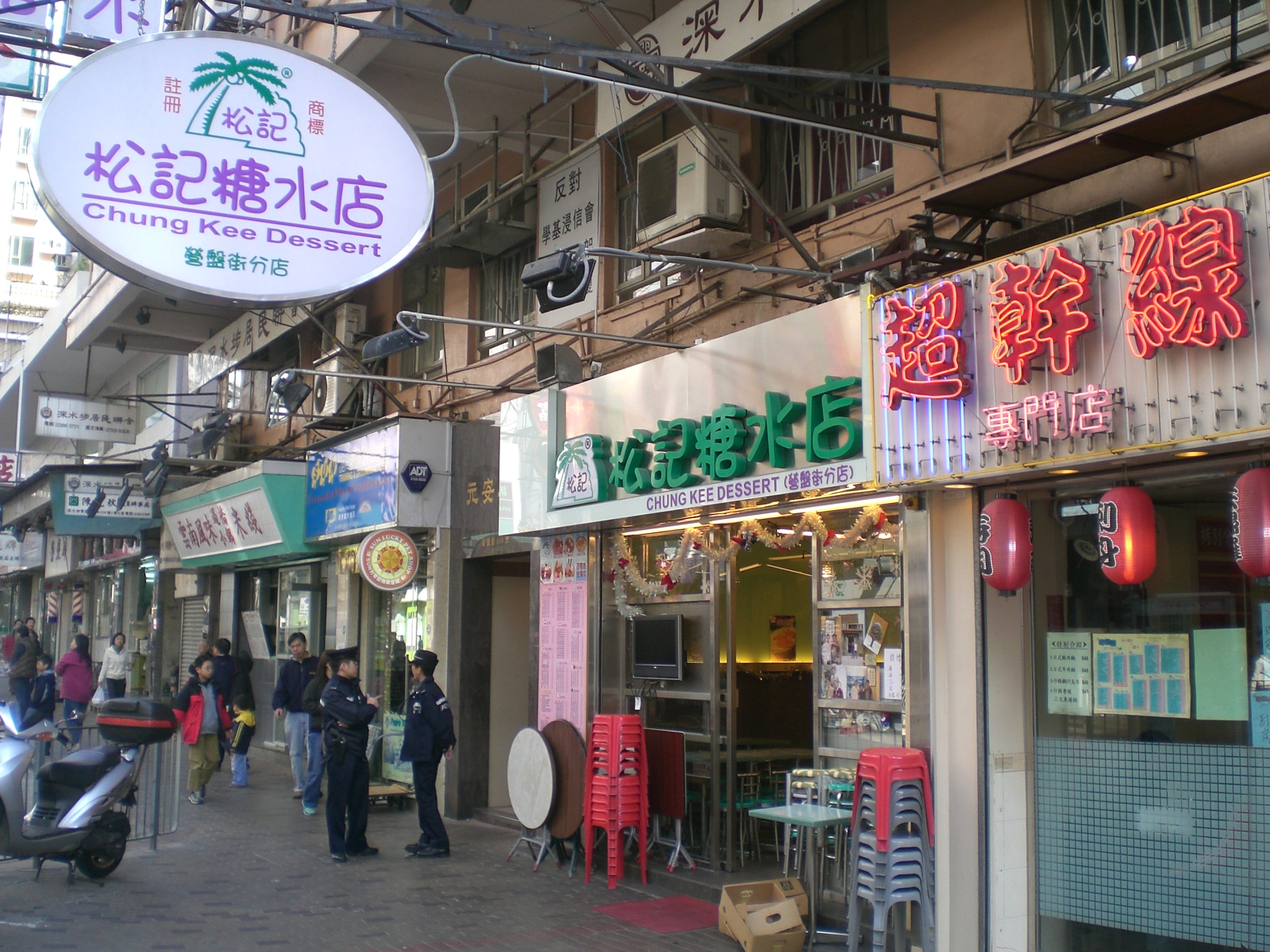 深水埗營盤街糖水商店